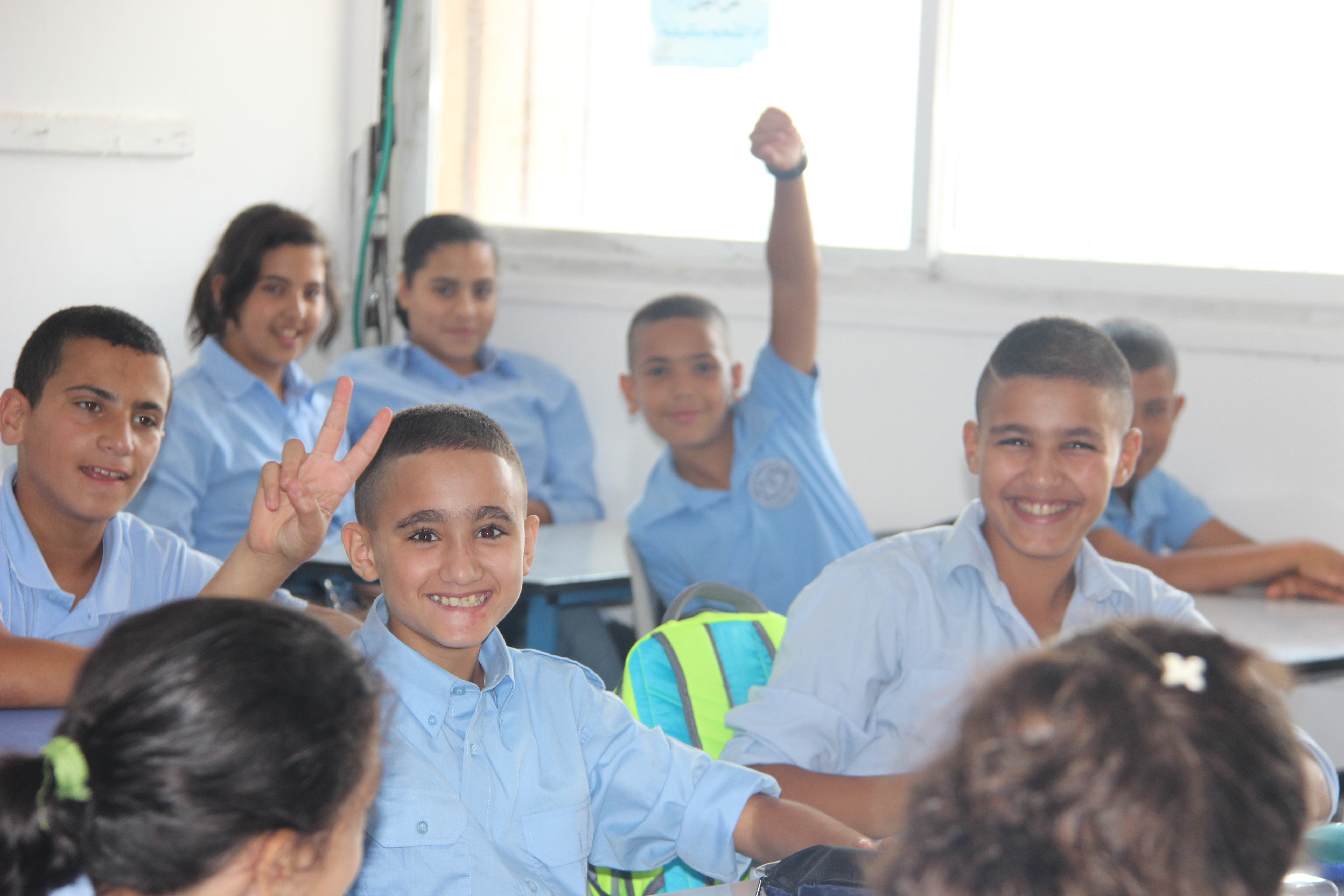 طلاب إعداديون من الصف السابع في مدرسة الغزالي بأم الفحم. العام الدراسي الجديد (2014-2015)